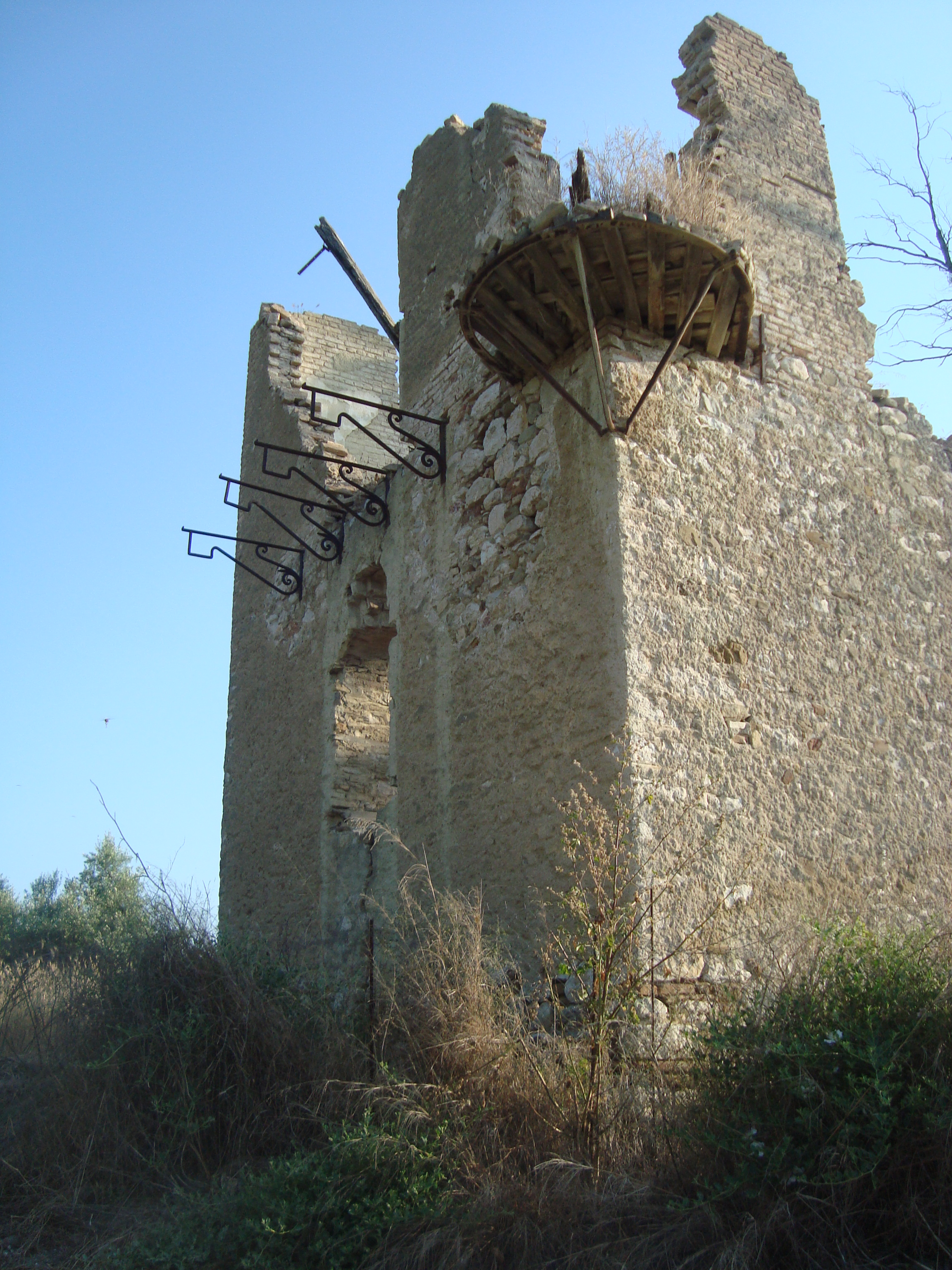 Το σπίτι του Κουτελιώτη (Μιντίλογλου) στο Μιντιλόγλι Αχαΐας, ο Μιντίλογλου ήταν Έλληνας ιδιοκτήτης της περιοχής με καταγωγή από την Μυτιλήνη όπου έδωσε το όνομα του στο χωριό